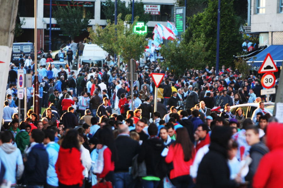 Seareiros do Celta achegándose ó estadio de Balaídos polo partido Celta-Dépor do 27 de outubro do 2012.